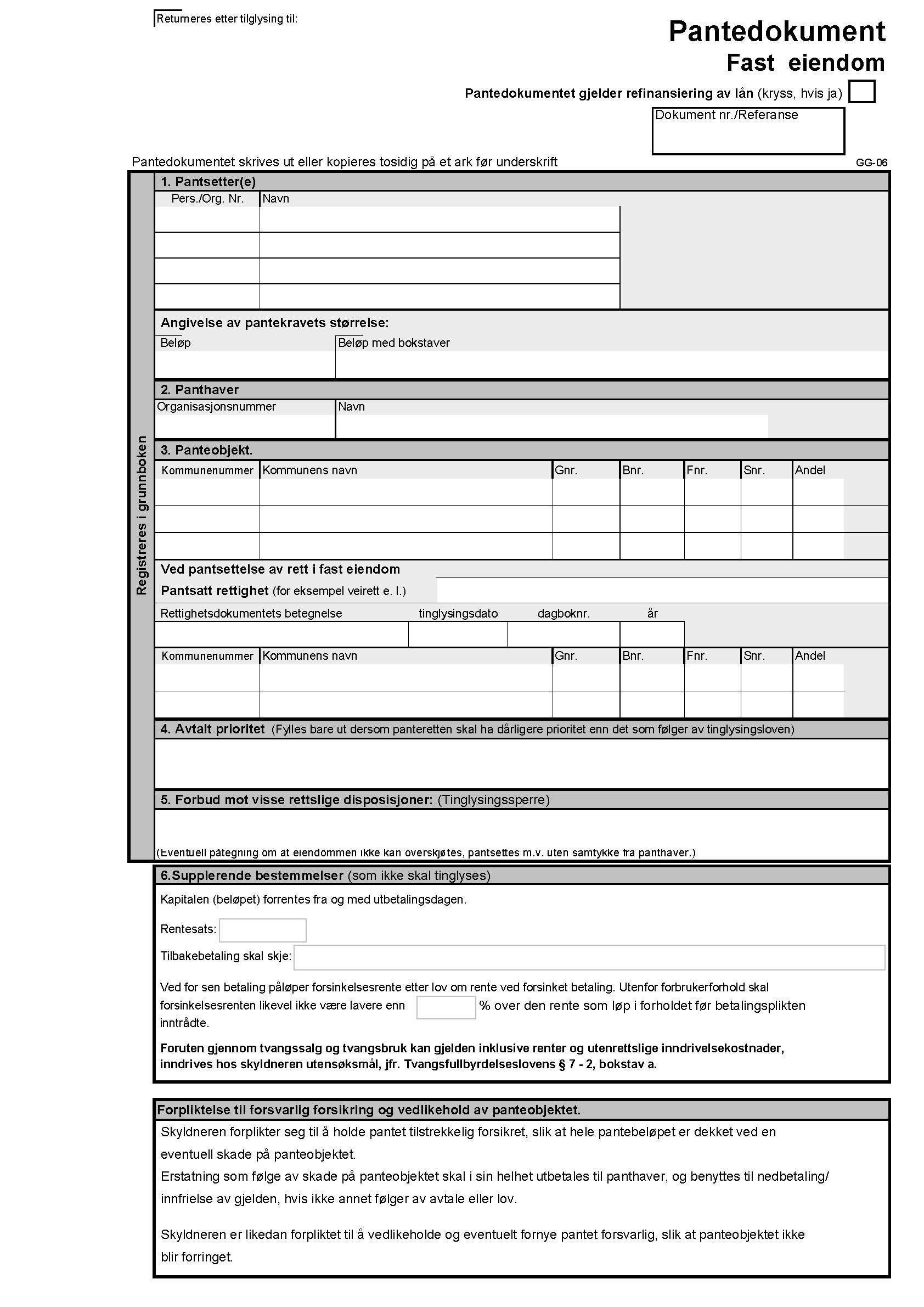 Pantedokument side 1. Norsk panterett.